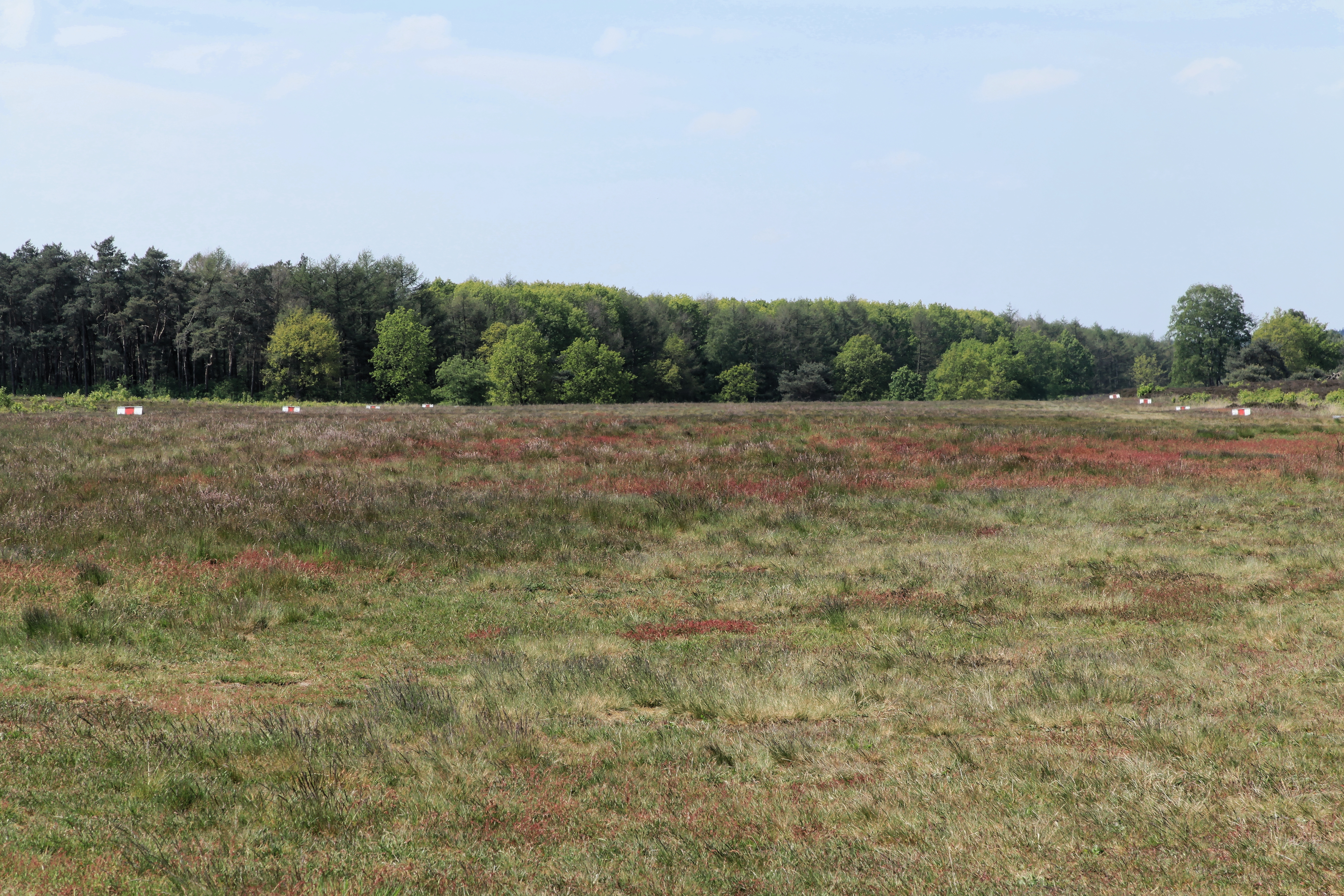 Flugplatz Steinberg ("Segelfluggelände Steinberg bei Surwold") im Naturschutzgebiet Steinberg in Börger, Flugplatzstraße in Surwold